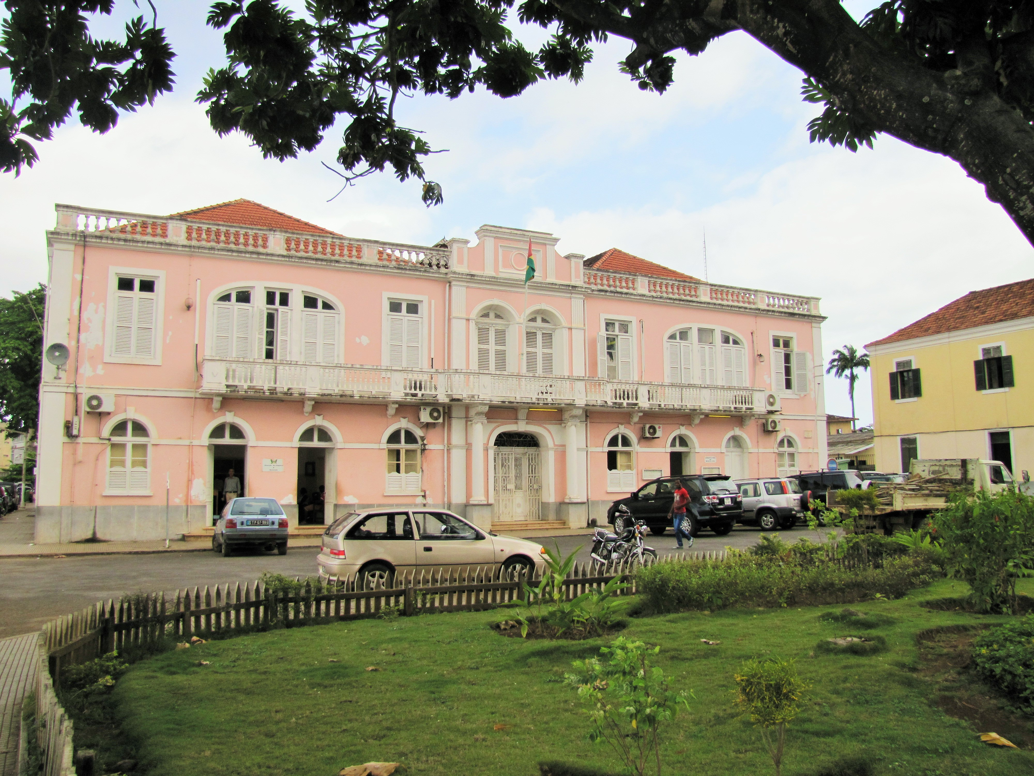 Building in São Tomé (supremo trubunal de justicia?)